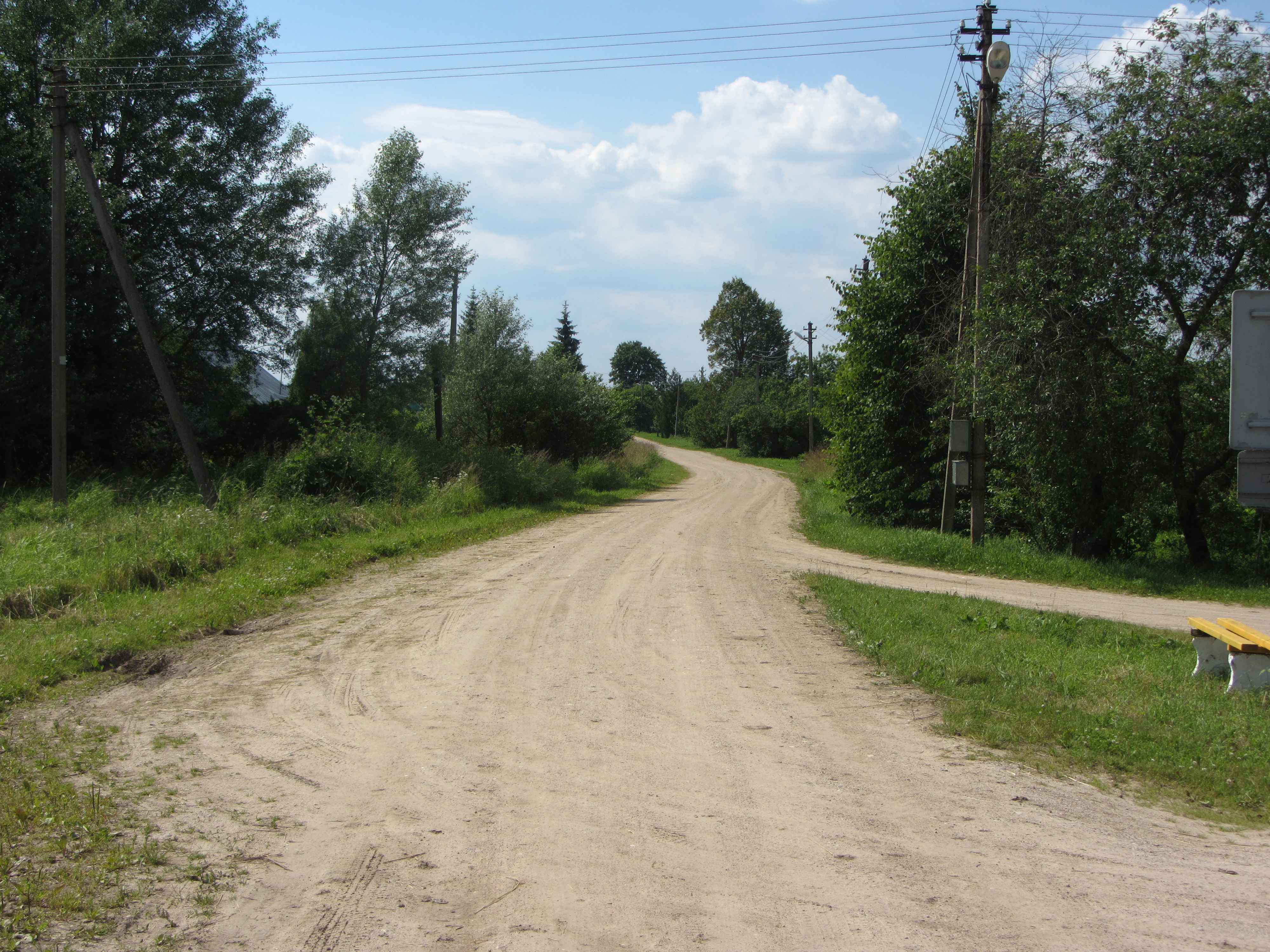 Vosiūnai, Lithuania